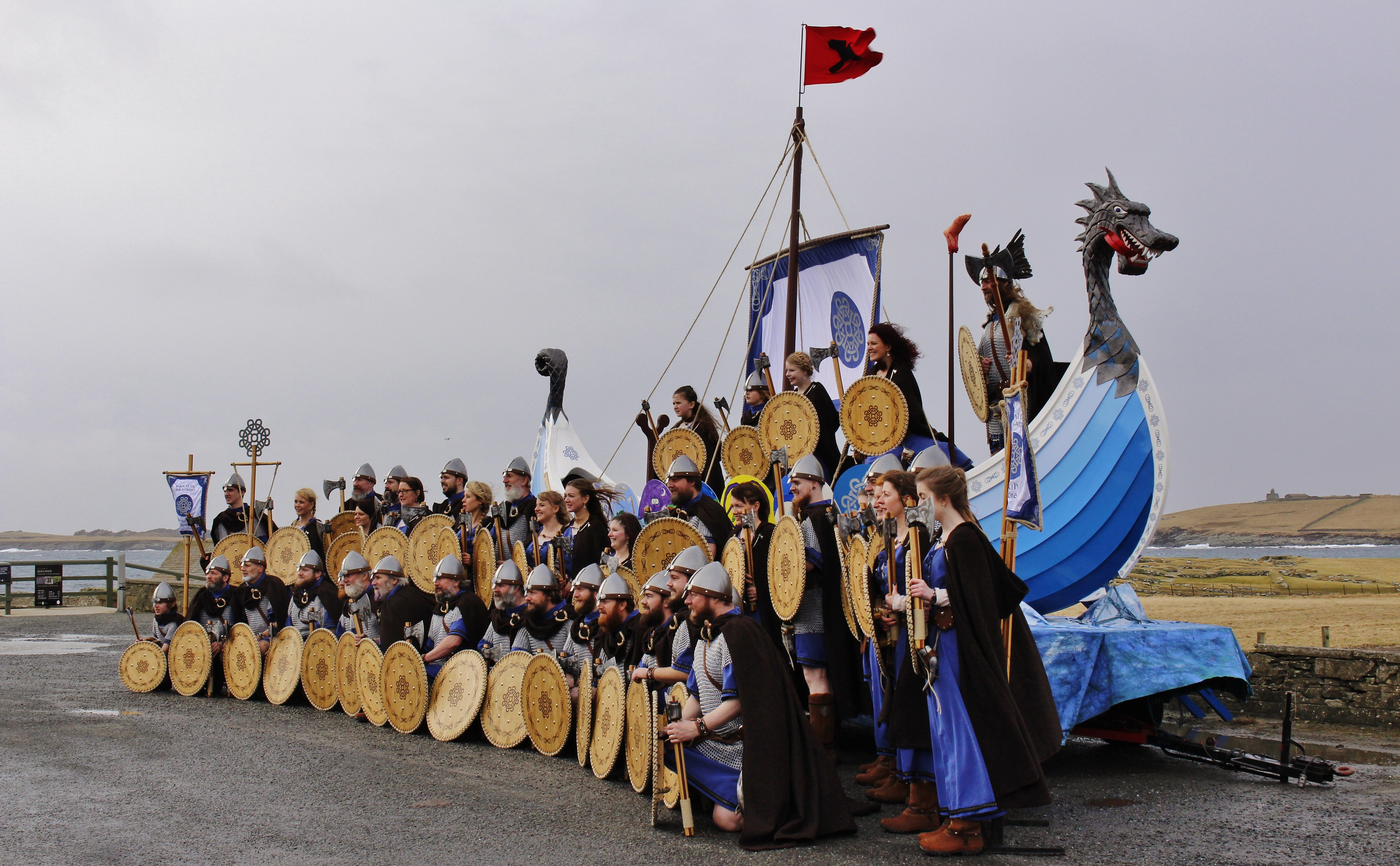 SMUHA _MG_0724